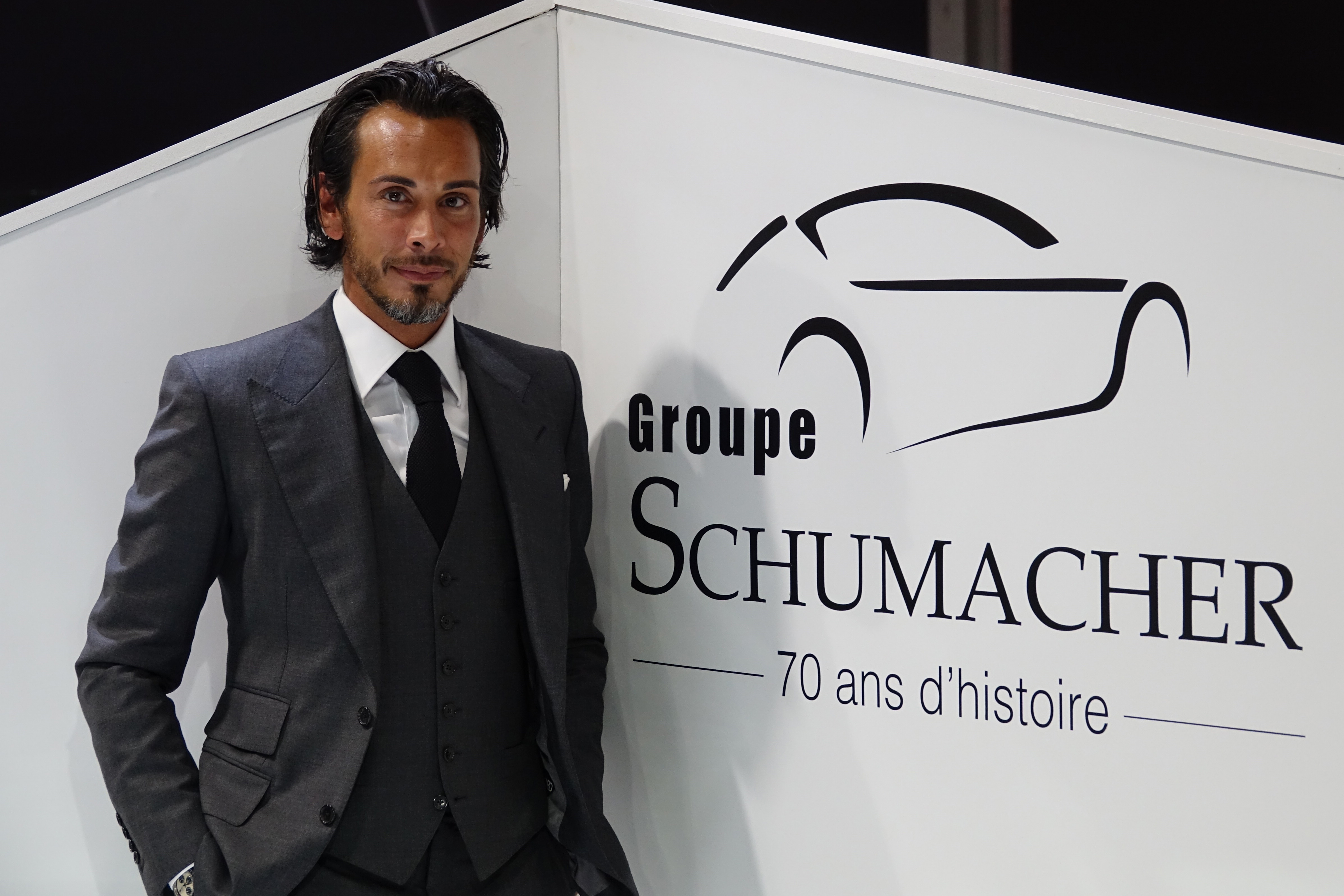 Groupe Schumacher au Mondial Paris Motor Show 2018